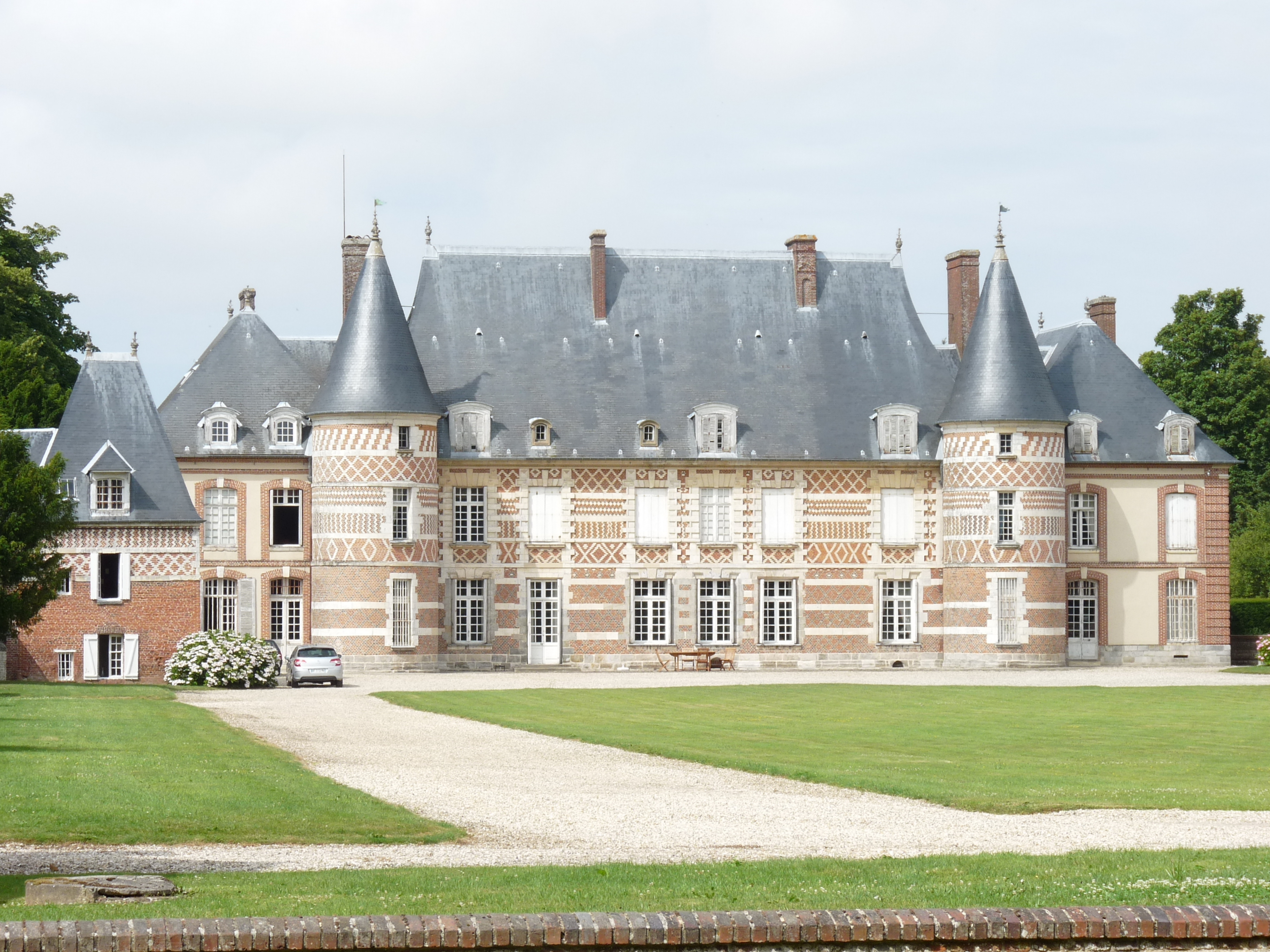 Château de Catteville (Inscrit) .